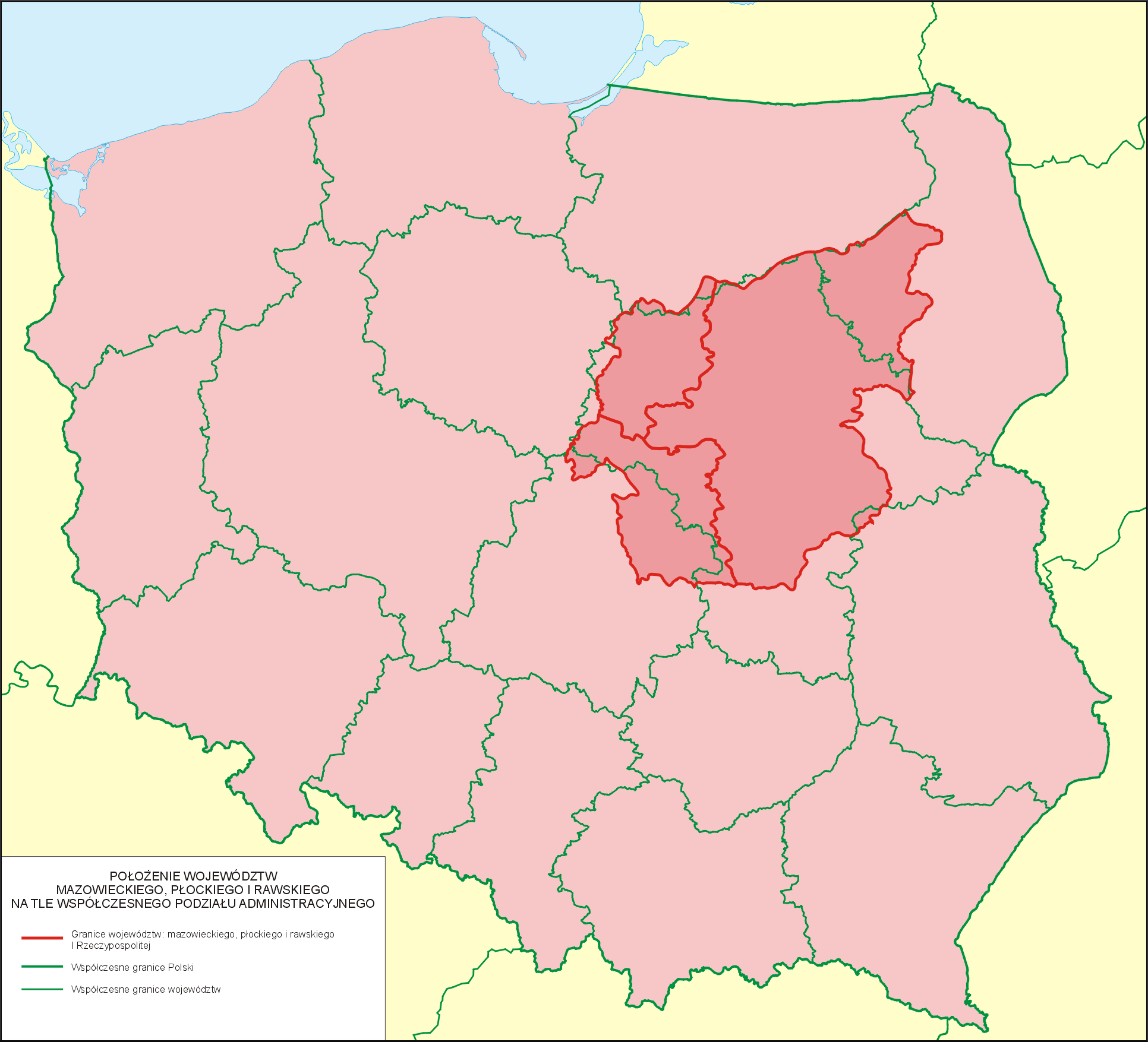 Położenie województw mazowieckiego, płockiego i rawskiego I Rzeczypospolitej na tle współczesnego podziału administracyjnego